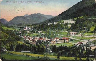 Tarvis 1915, aus dem niederl. Wikipedia. Kartentext: Ober- und Unter-Tarvis (Kärnten). Feldjäger-Kaserne im Hintergrund.